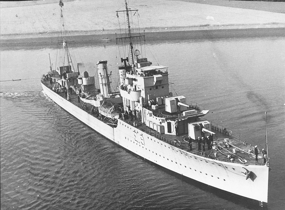 Der argentinische Zerstörer SAN JUAN 1938